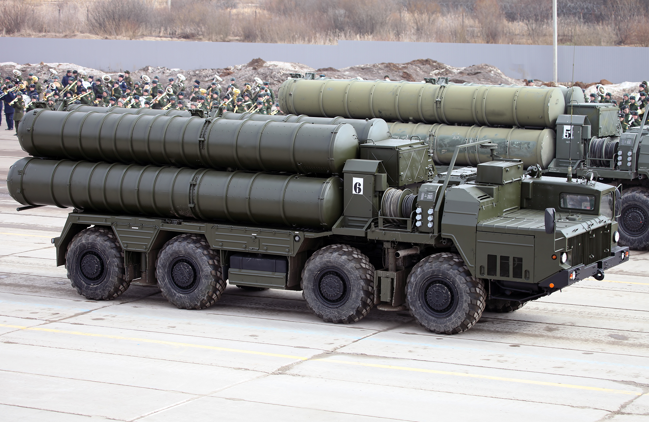 Пусковая установка 5П85СМ2-01 из состава ЗРС С-400 (5P85SM2-01 TEL for S-400 system)